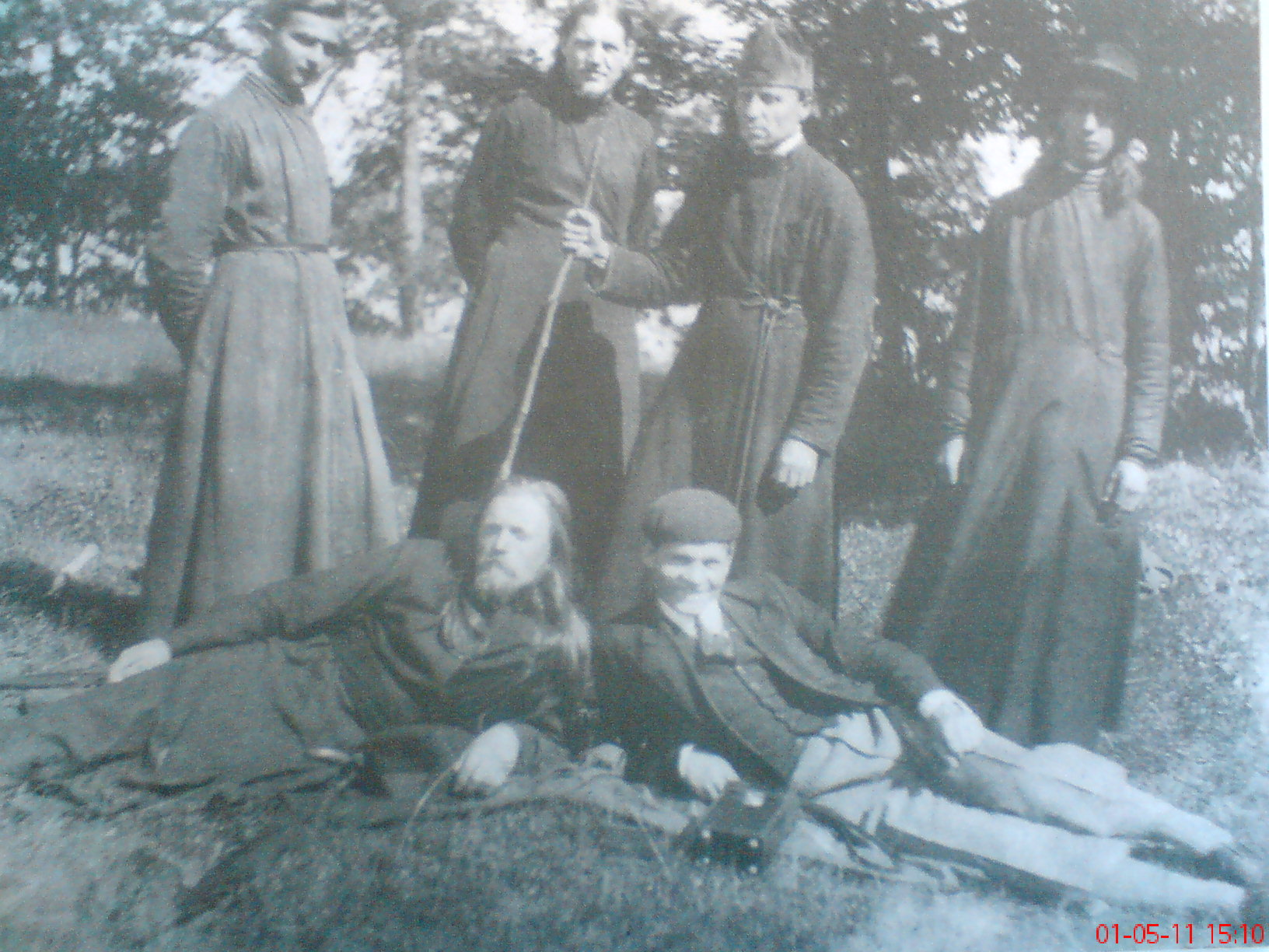 Mnisi i pracownicy klasztoru św. Onufrego w Jabłecznej, lata 30. XX wieku